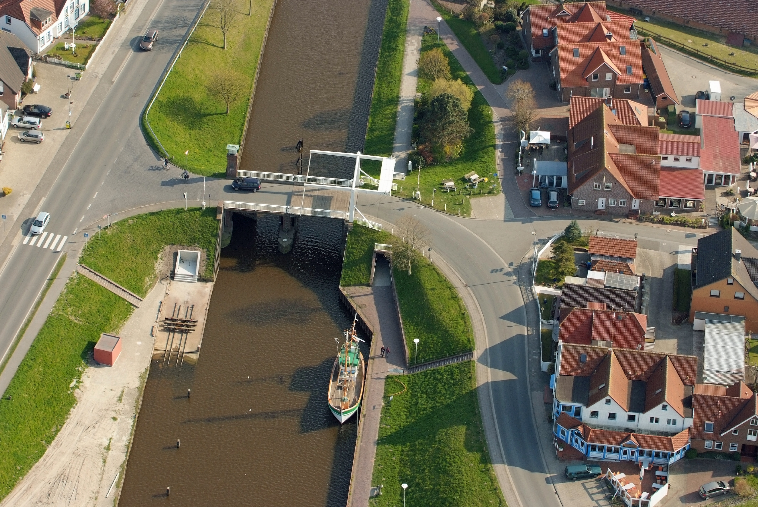 Fotoflug von Nordholz-Spieka nach Oldenburg und Papenburg